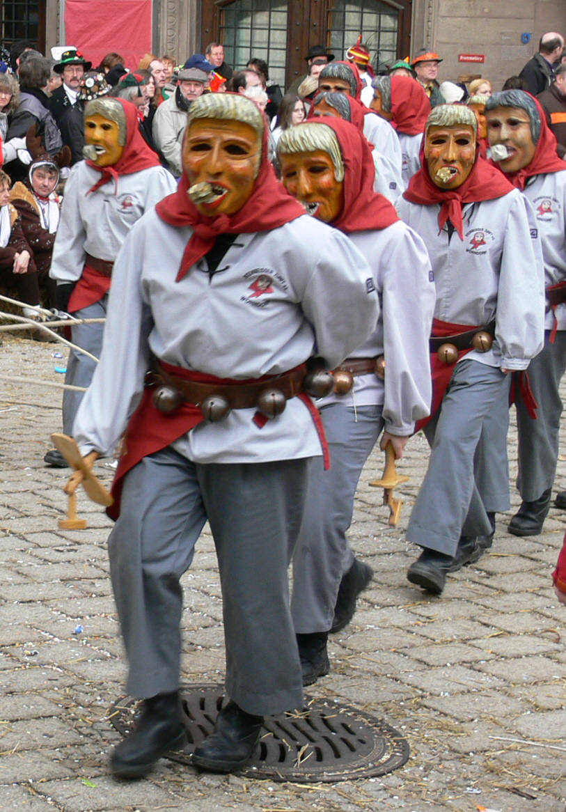 Steinbeißerzunft Worndorf, Figur: Steinbeißer Veranstaltung: Narrensprung beim Narrentreffen Meßkirch 2006